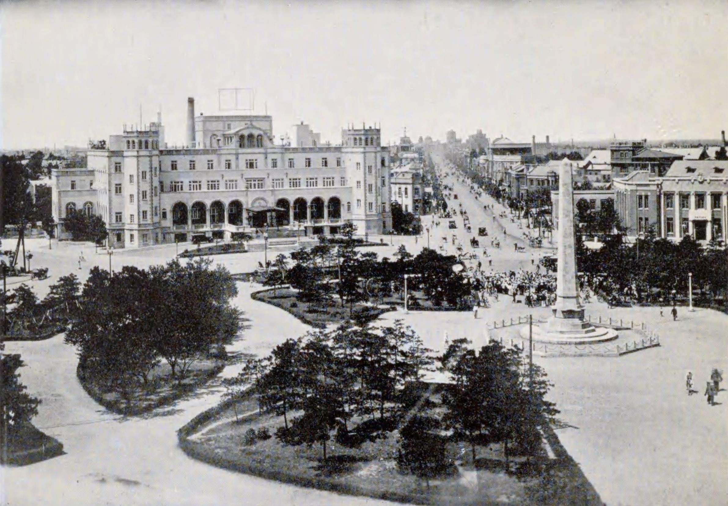 奉天大広場（全満洲名勝写真帖）